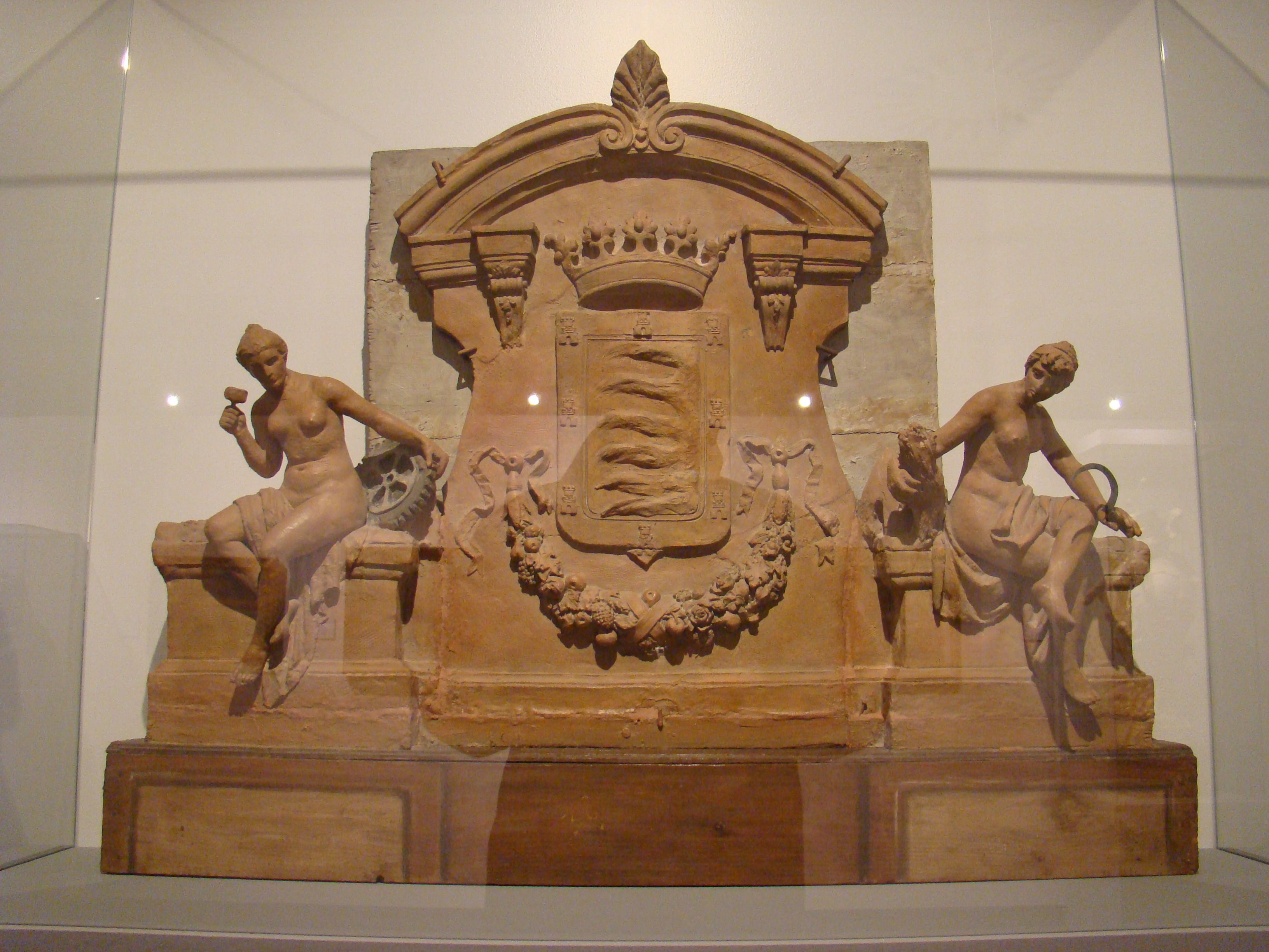 Museo de la Universidad de Valladolid. Boceto para el tímpano de la fachada de la estación de Valladolid.